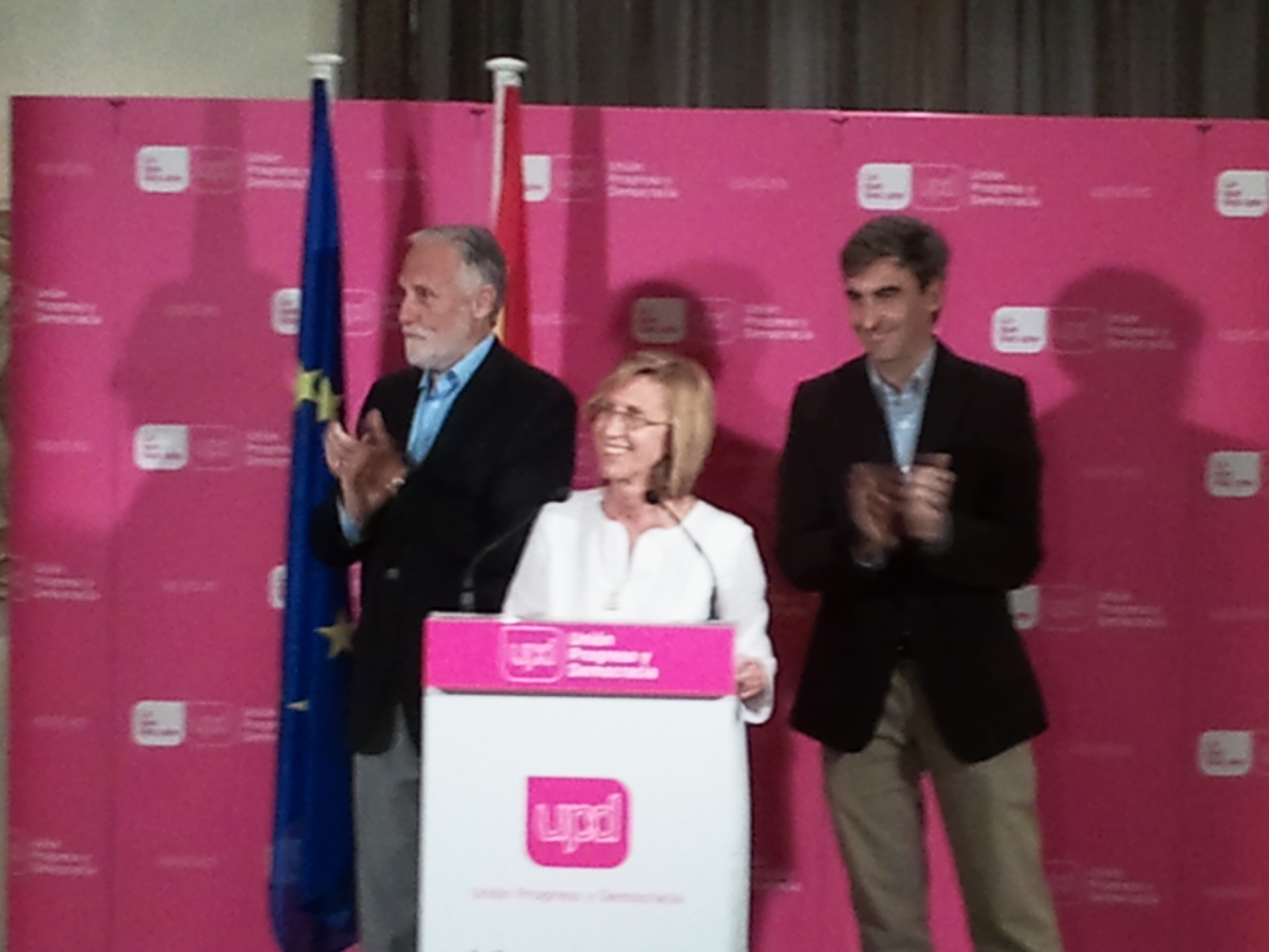 Rueda de prensa y celebración de UPyD en el Hotel Villa Real de Madrid, tras las elecciones autonómicas y locales de 2011.